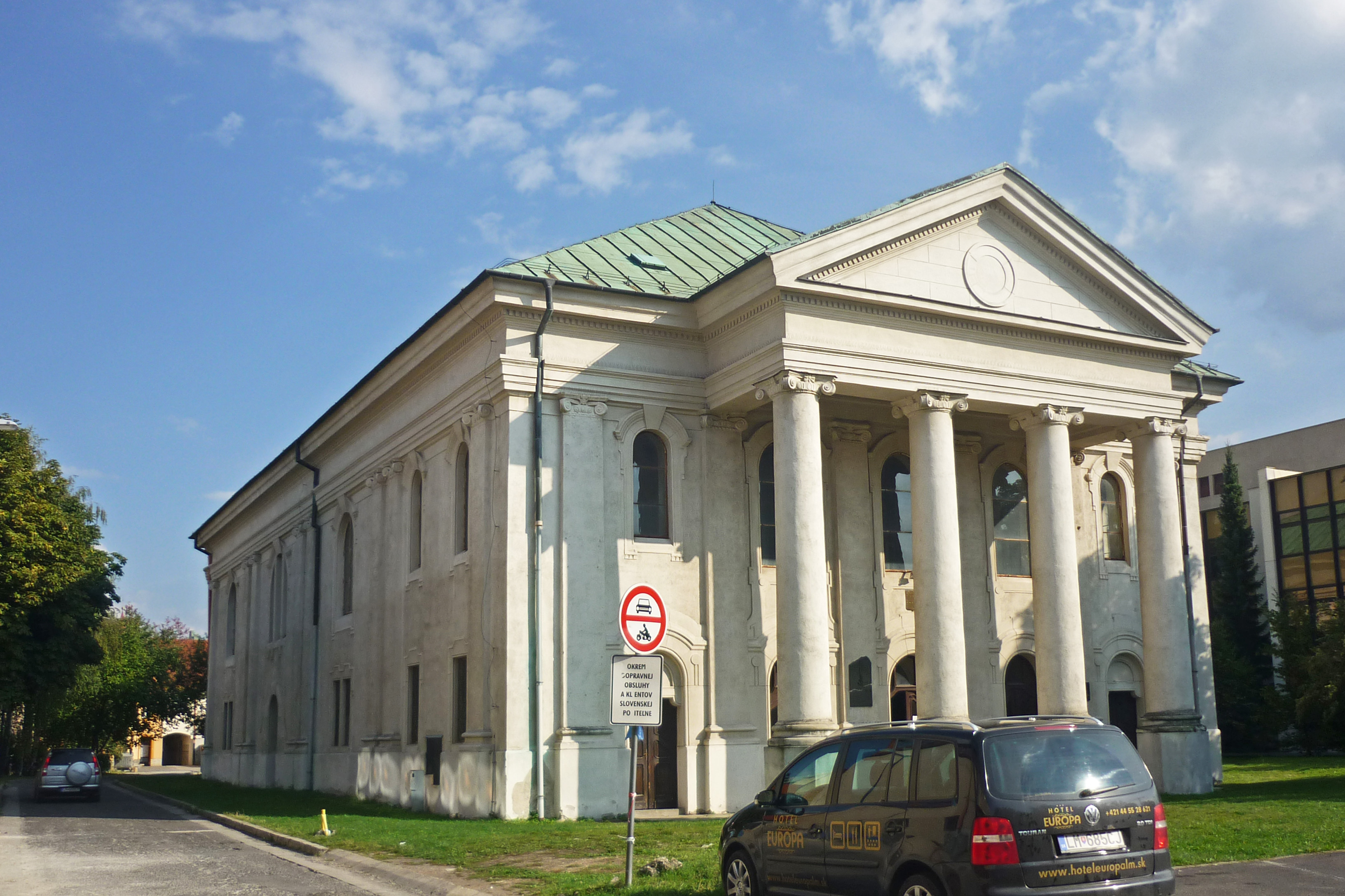 Synagoge in Liptovský Mikuláš (Sankt Nikolaus in der Liptau) in der Slowakei